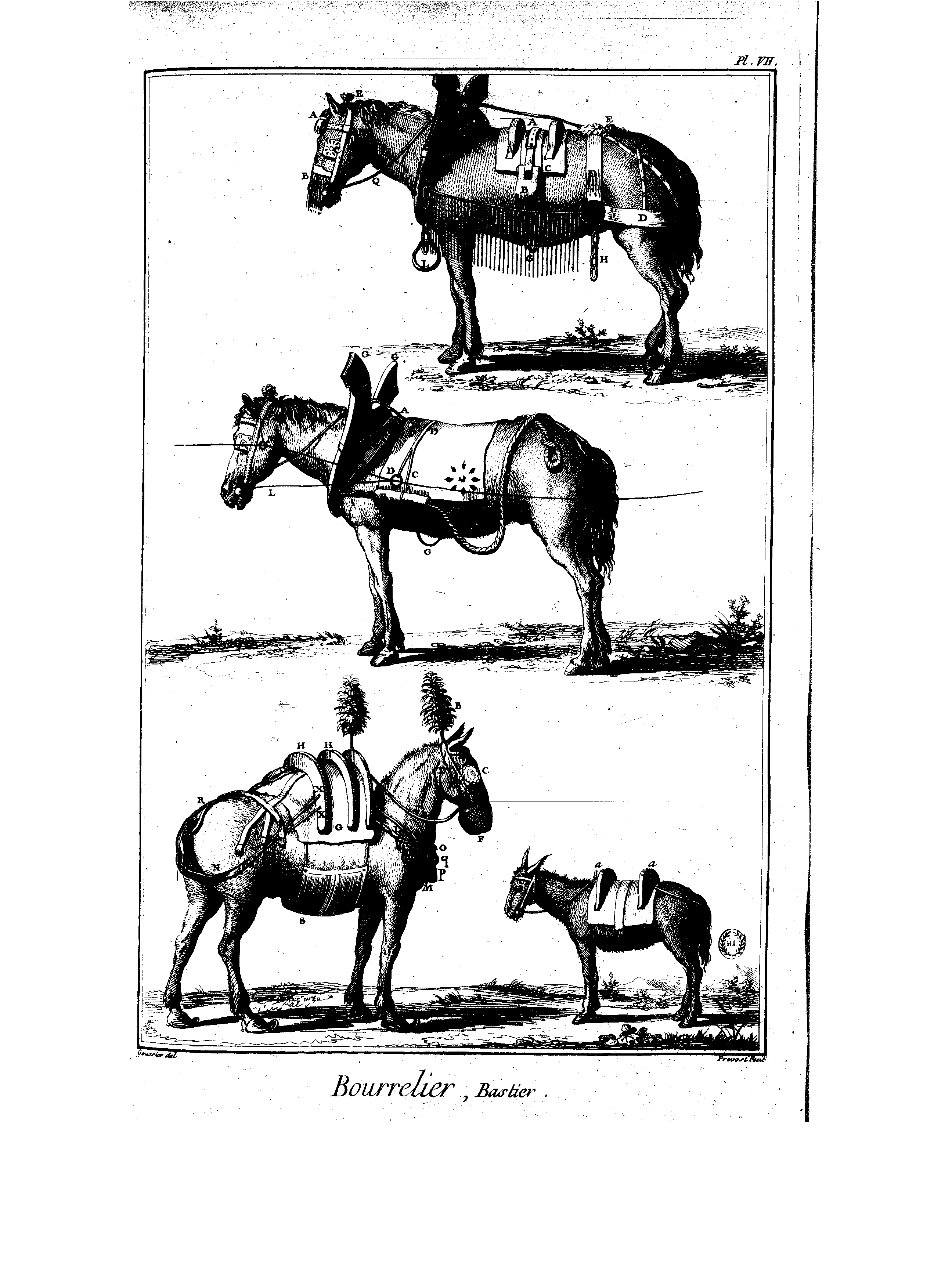 Planches de l'Encyclopédie de Diderot et d'Alembert, volume 2.